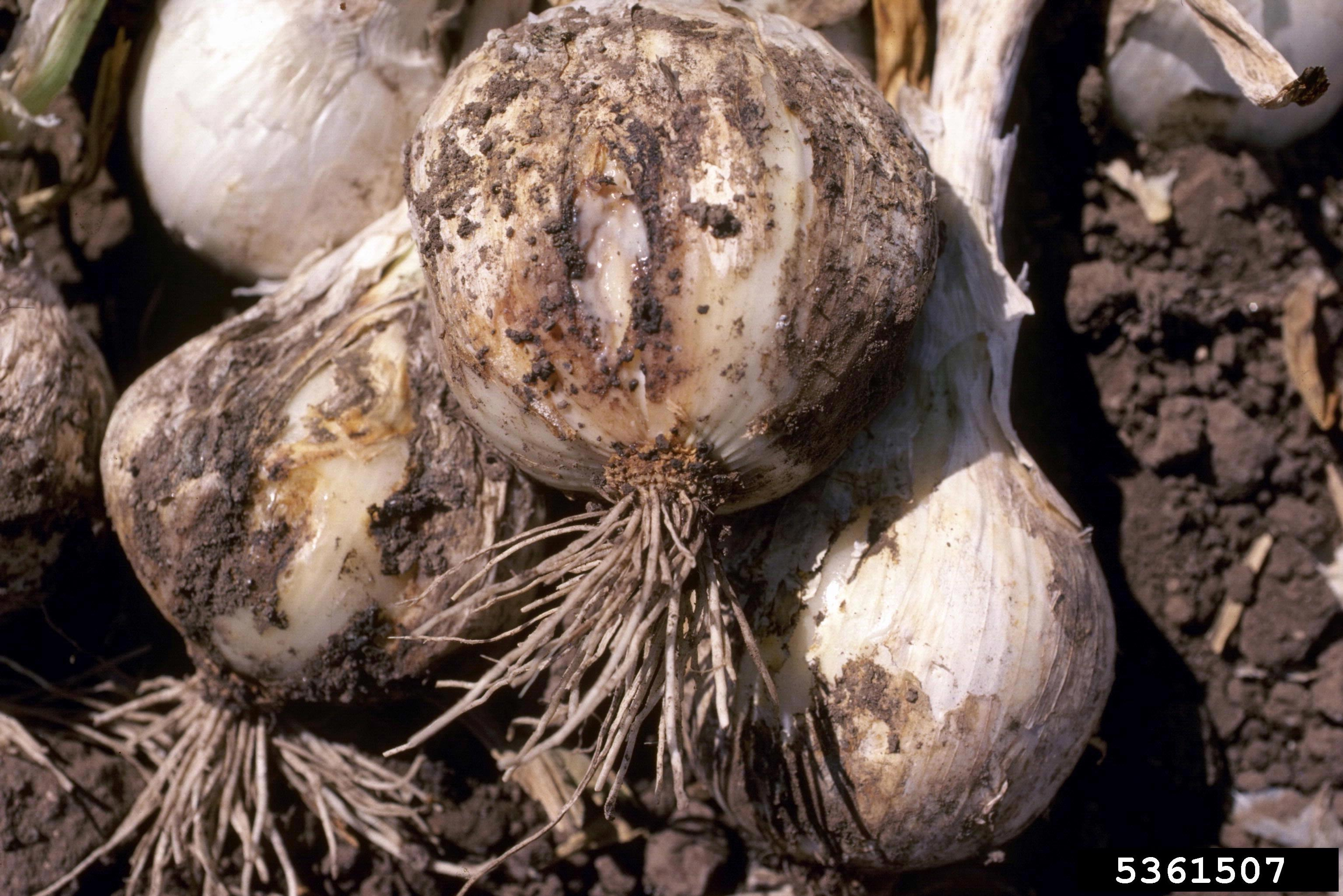 Ditylenchus dipsaci at Allium cepa